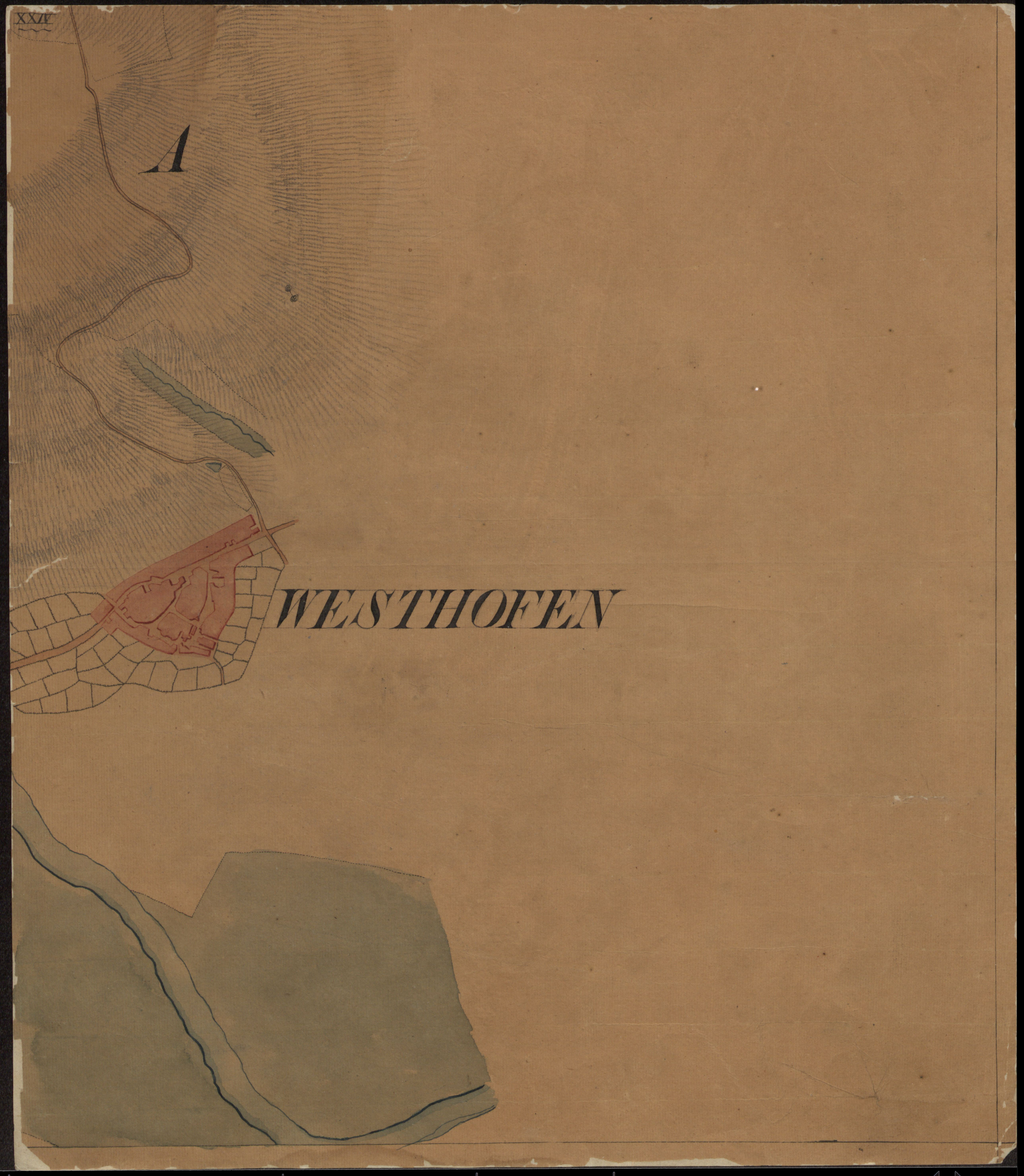 Spezialkarte des westlichen Teils des Distrikts Hoerde. Nachdruck als „Carte speciale des mines“.